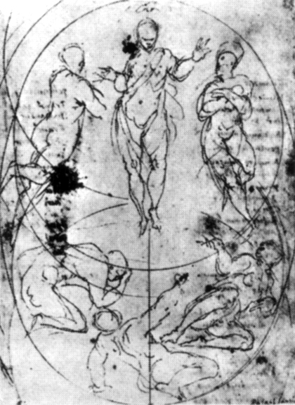 RAFFAELLO Sanzio The Transfiguration